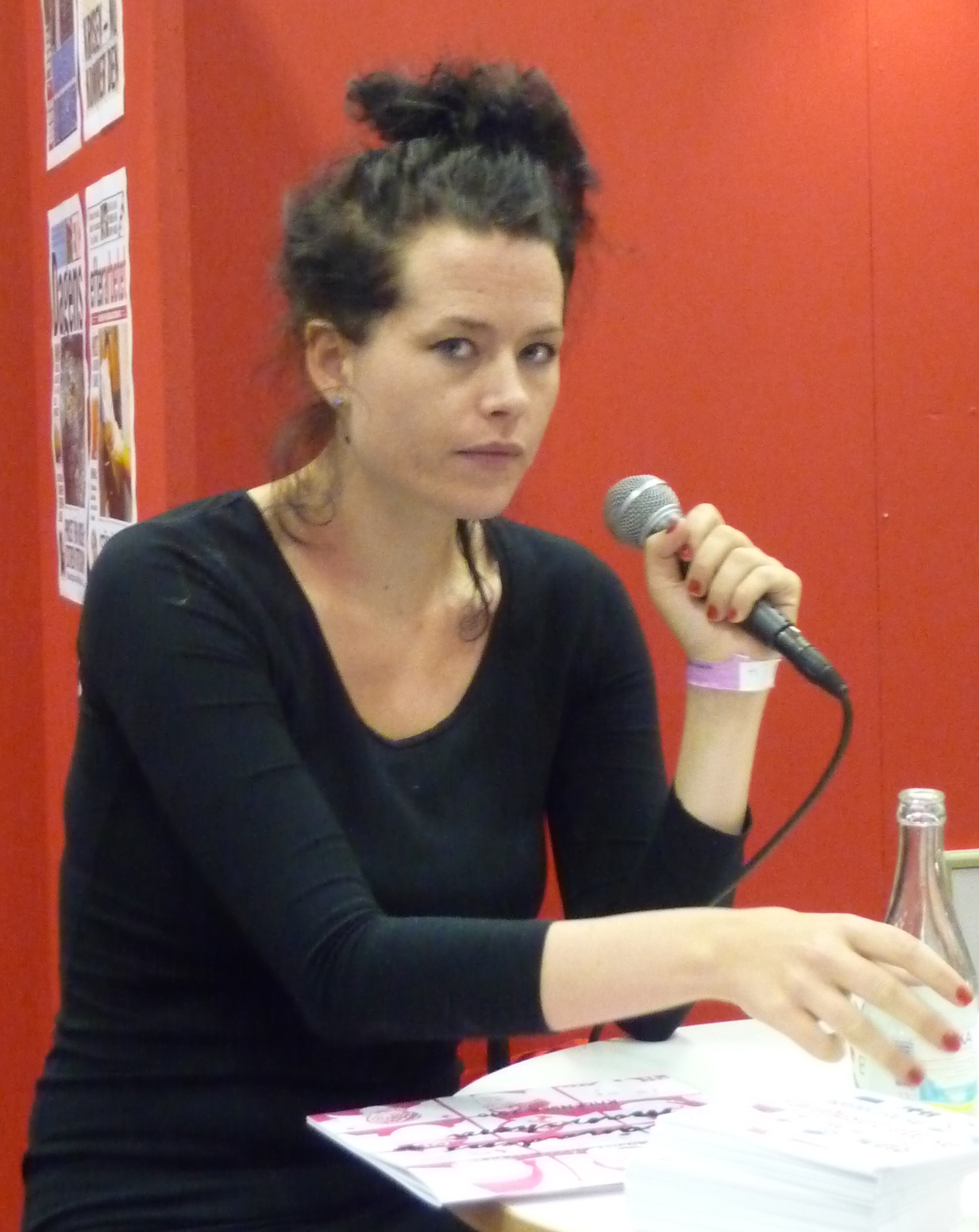 Liv Strömqvist på bokmässan i Göteborg 2009.